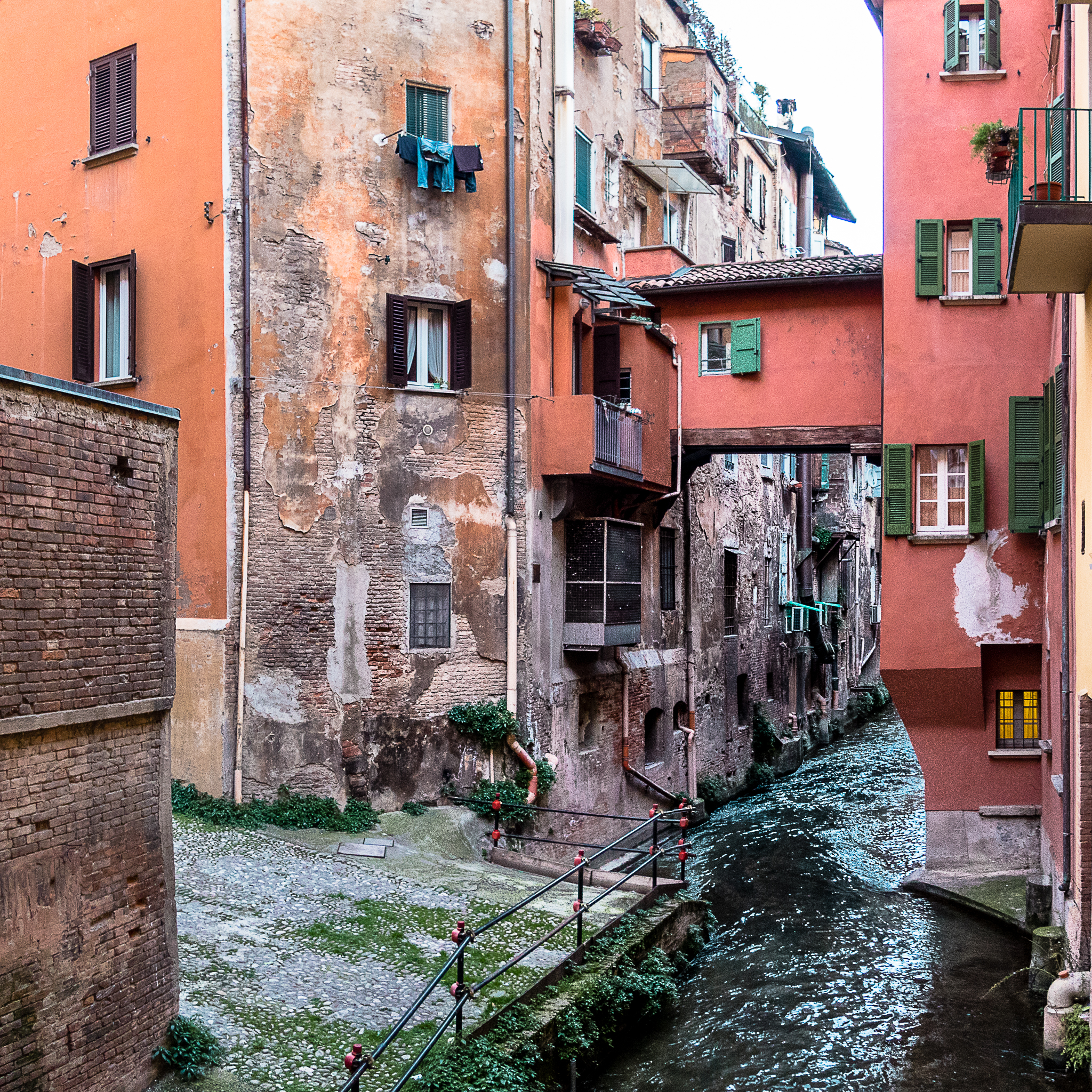 “Scorci di Bologna” This is a photo of a monument which is part of cultural heritage of Italy.